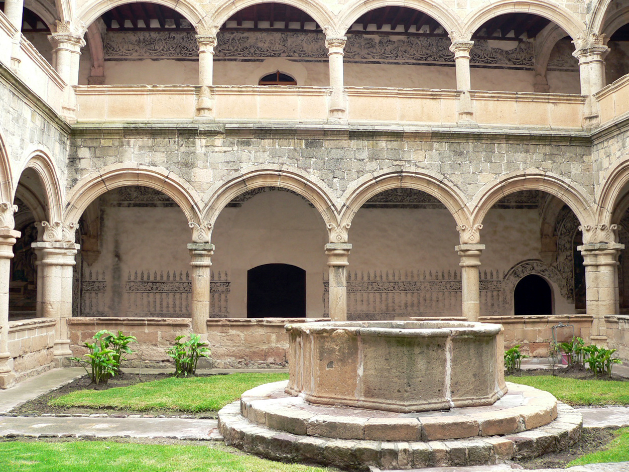 Vista interior desde la planta baja del Ex Convento de San Andrés Apóstol